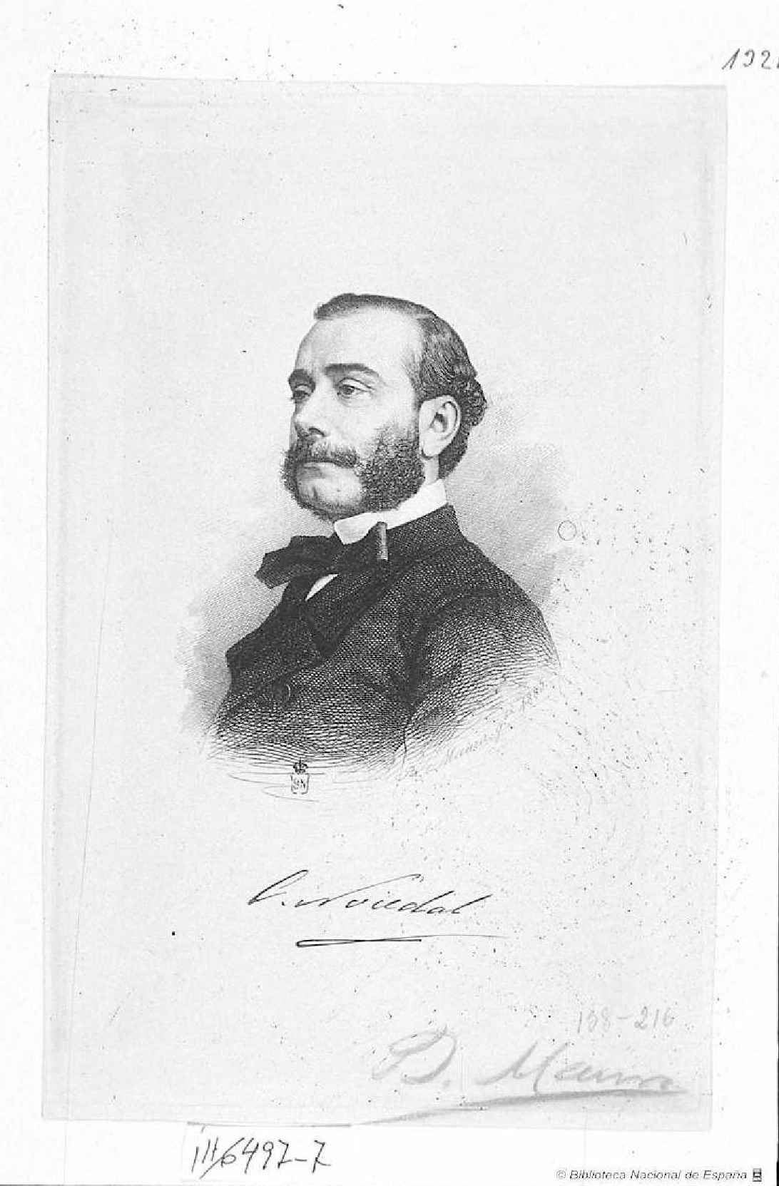 Retrato de Cándido Nocedal, aguafuerte, Biblioteca Nacional de España. Facsímil del autógrafo: C. Nocedal